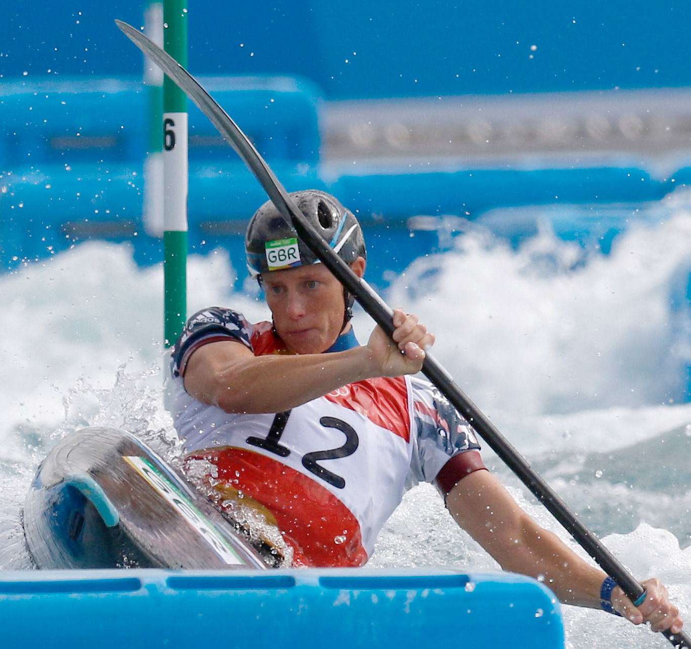 Rio de Janeiro - Britânica Fiona Pennie disputa canoagem slalom categoria K1 nos Jogos Olímpicos Rio 2016 no X Park em Deodoro (Fernando Frazão/Agência Brasil)